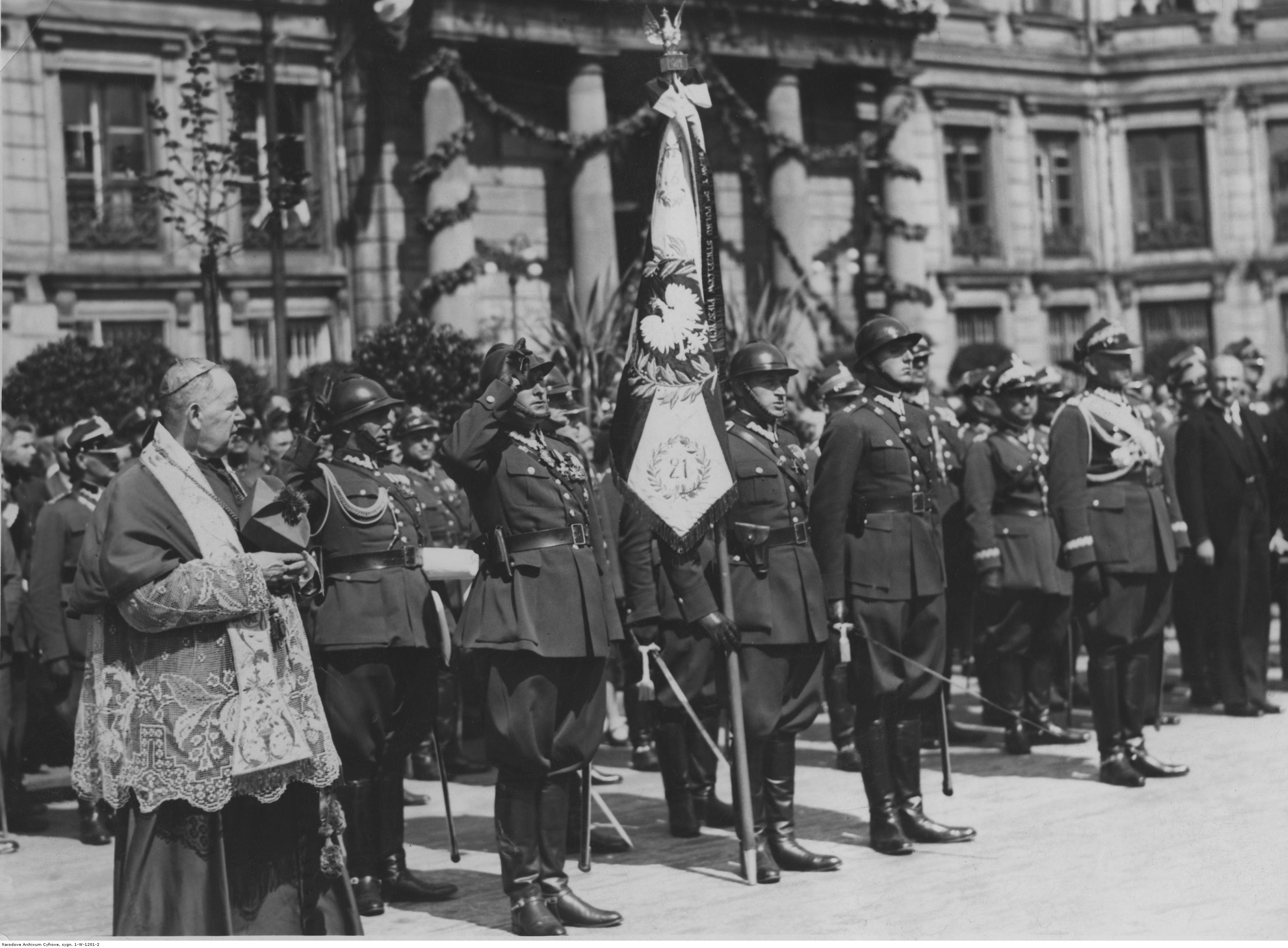 Święto 21 pułku piechoty w Warszawie. Poczet sztandarowy z nowo wręczonym sztandarem. Z lewej strony widoczny bp polowy Stanisław Gall. Koncern Ilustrowany Kurier Codzienny - Archiwum Ilustracji. Sygnatura: 1-W-1201-2